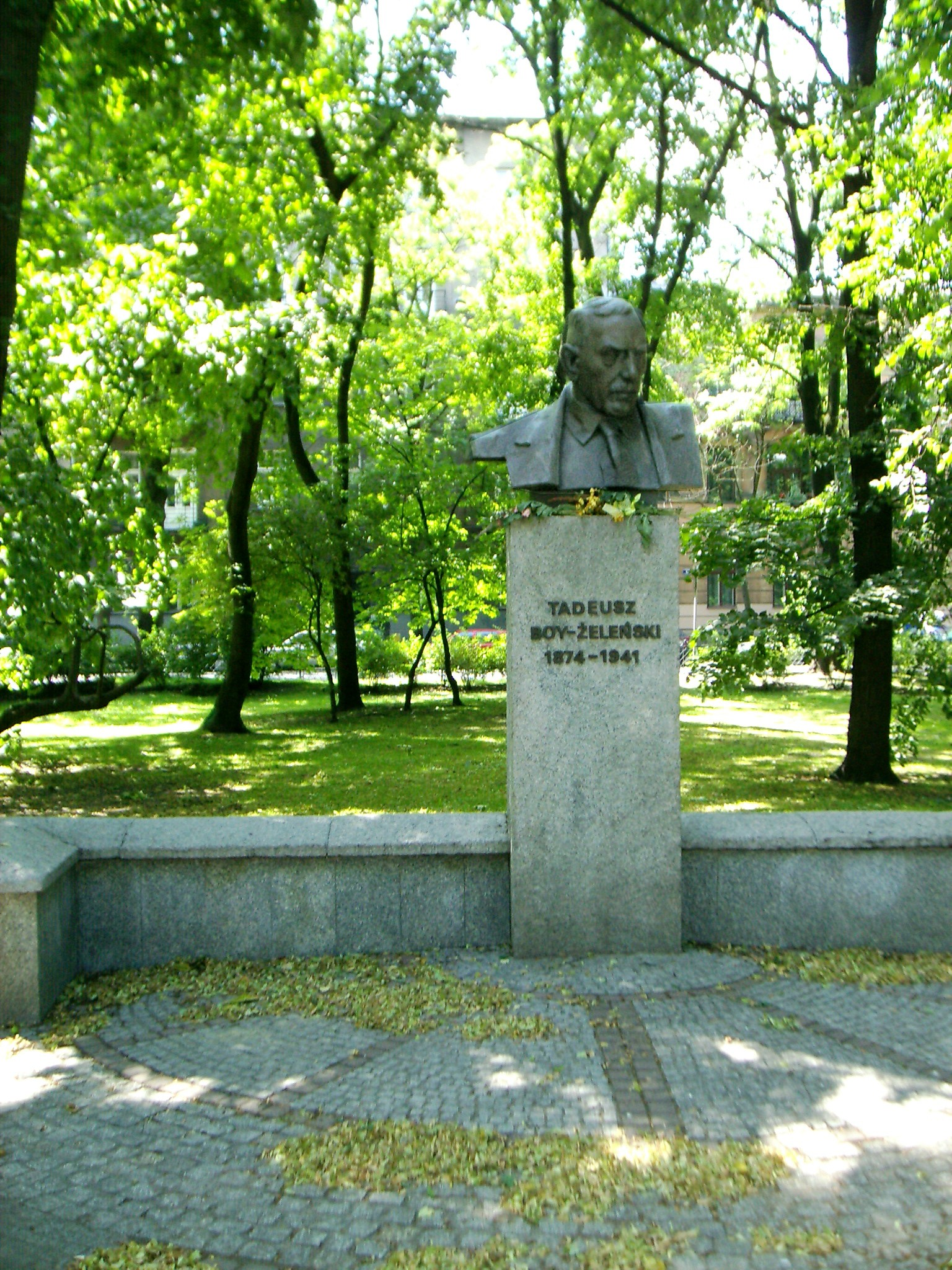 Popiersie Tadeusza Żeleńskiego-Boya. Kraków - Planty.